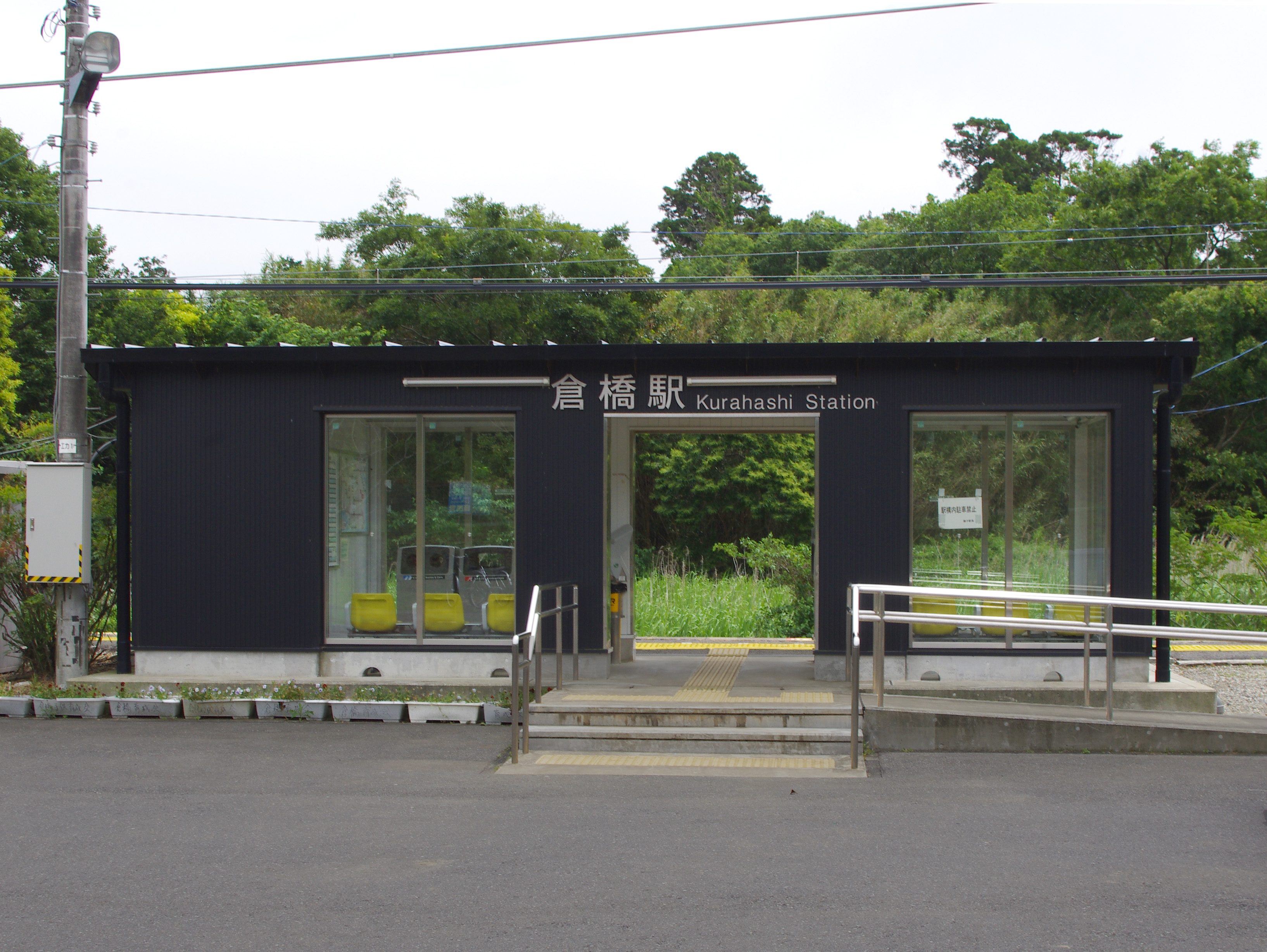 倉橋駅 駅入り口（2013年6月1日撮影）